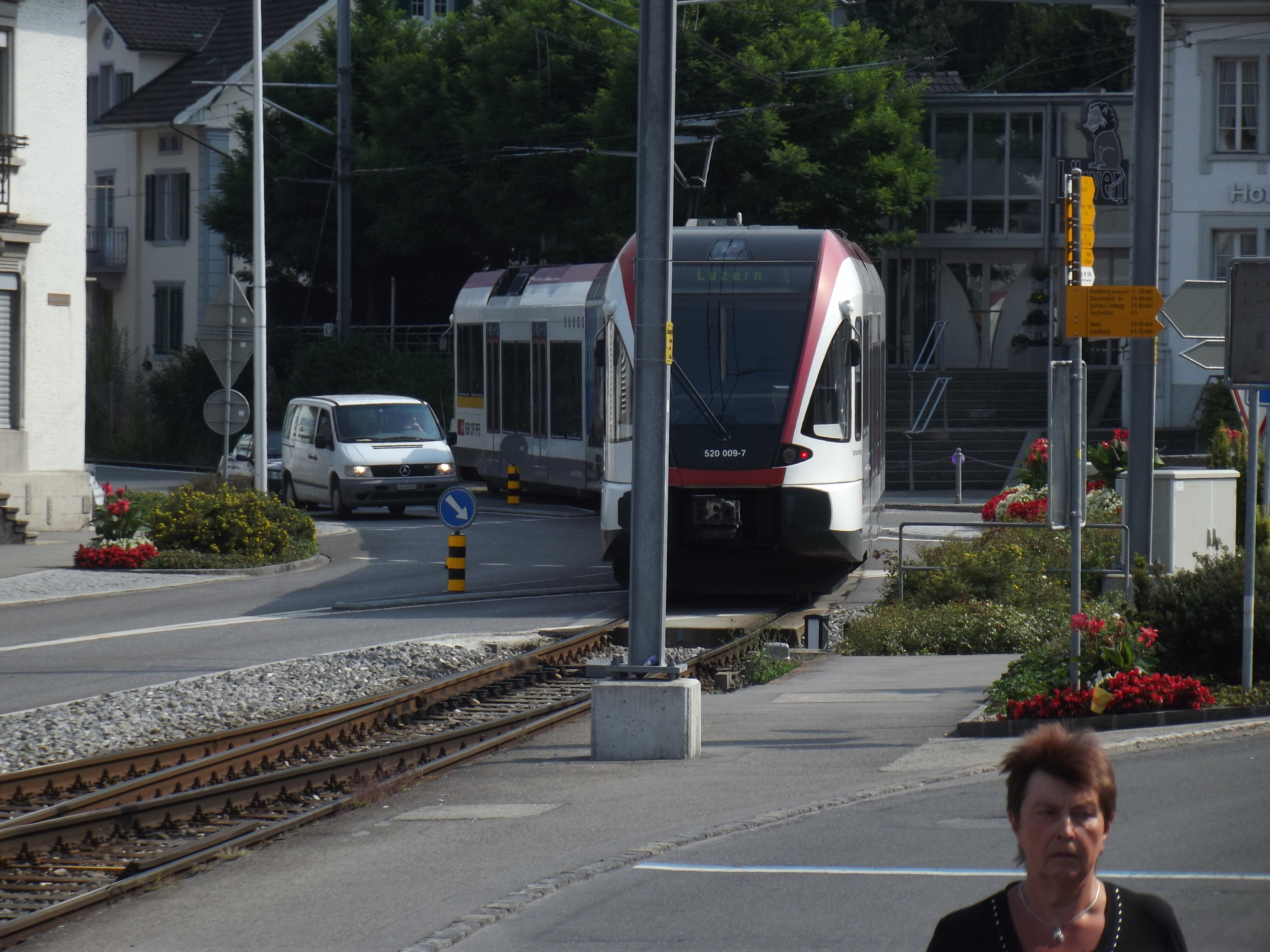 Trein van de Seetalbahn over een wegverkeerkruispunt.